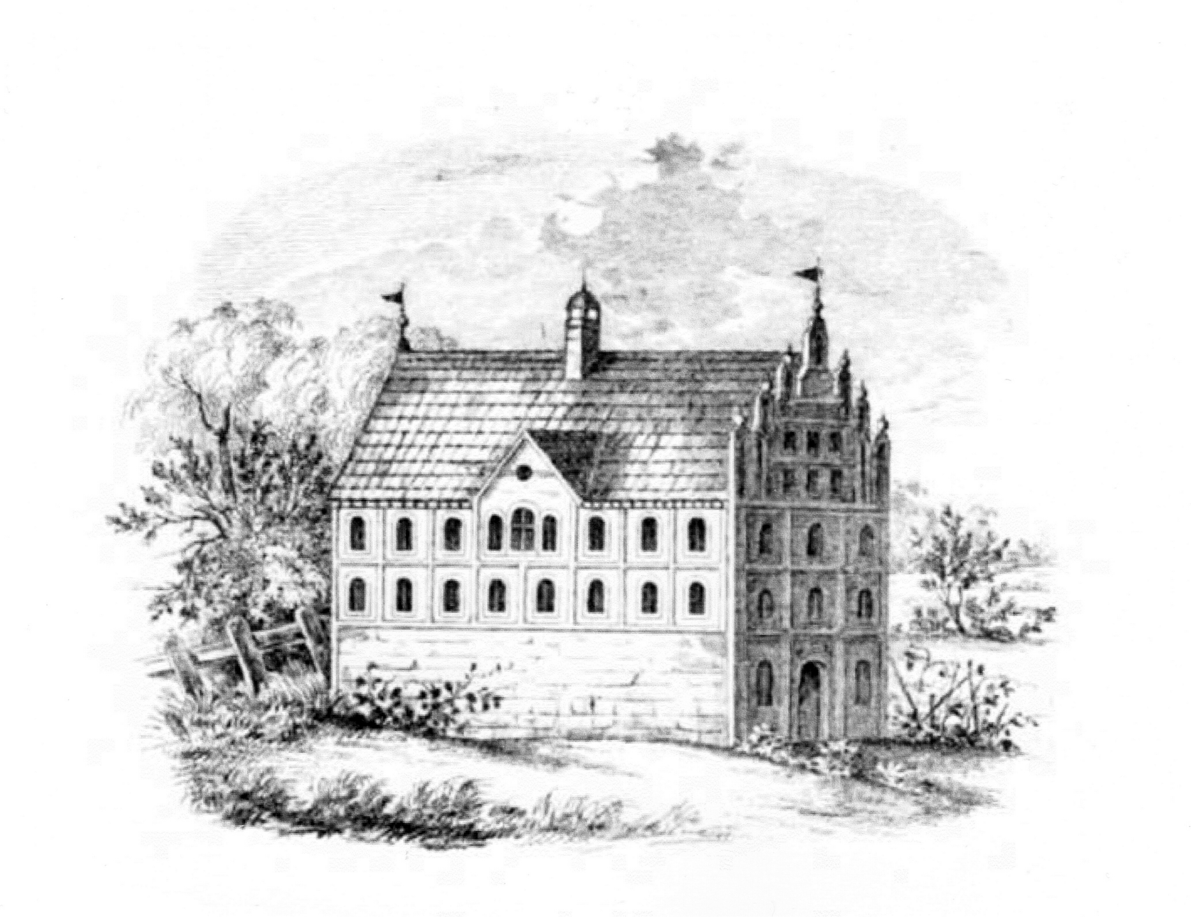 Adliges Gut Bothkamp, Zeichnung von Köhler und Roisternitz 1862